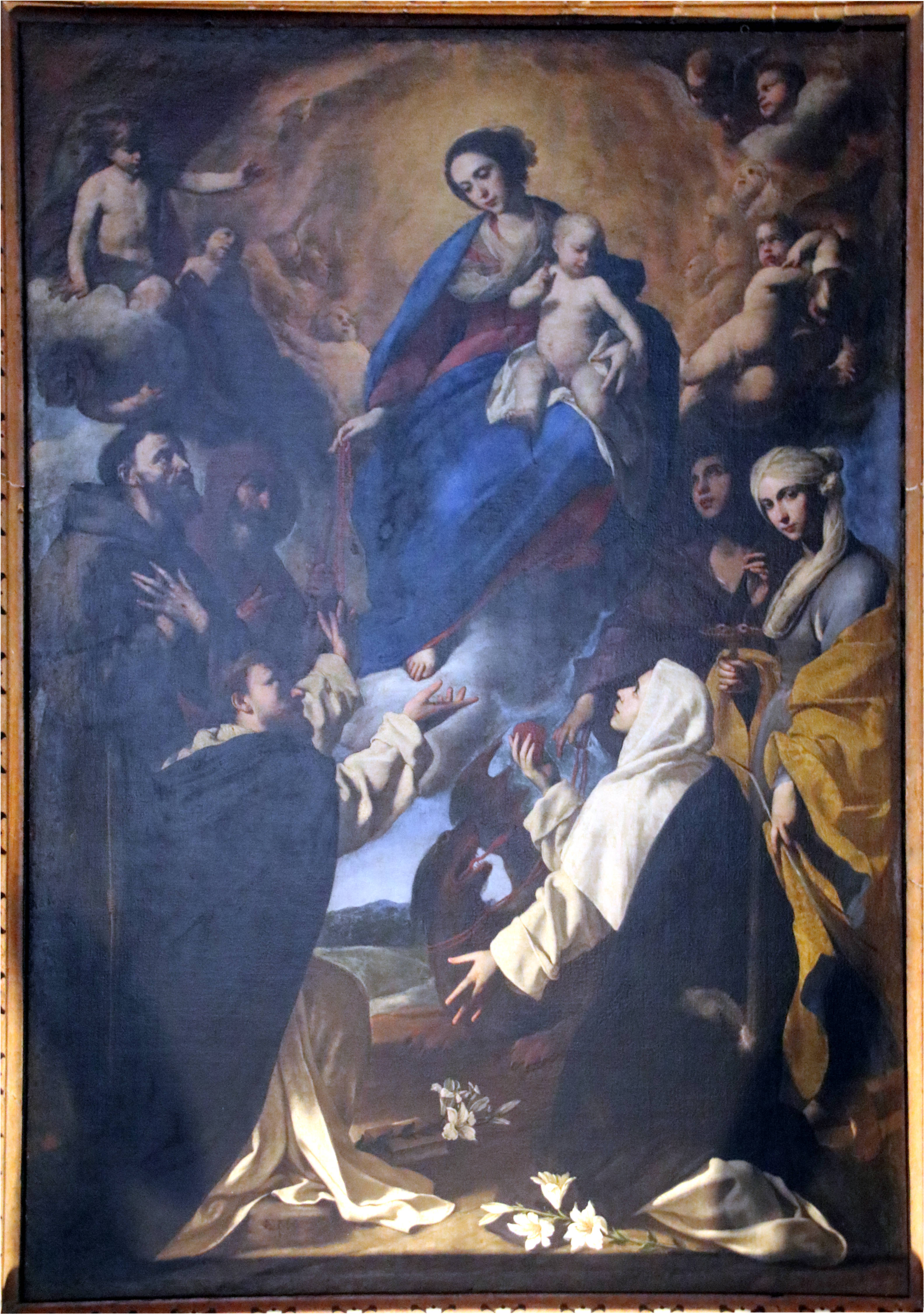 Massimo Stanzione, Madonna del Rosario, Cappella Cacace, basilica di San Lorenzo Maggiore (Napoli)